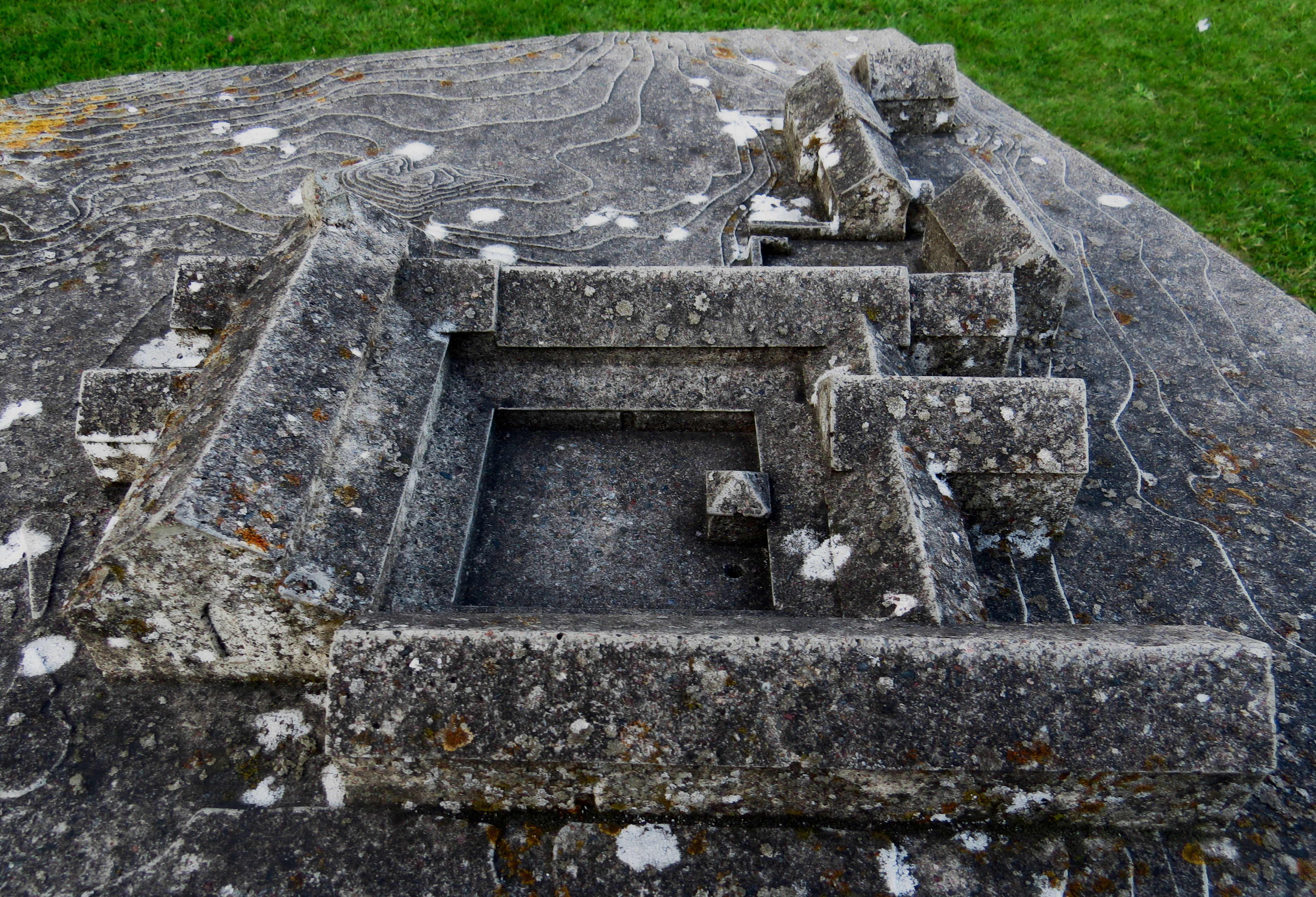 Modell des Klosters Alvastra, aufgestellt in der Ruine des Klosters